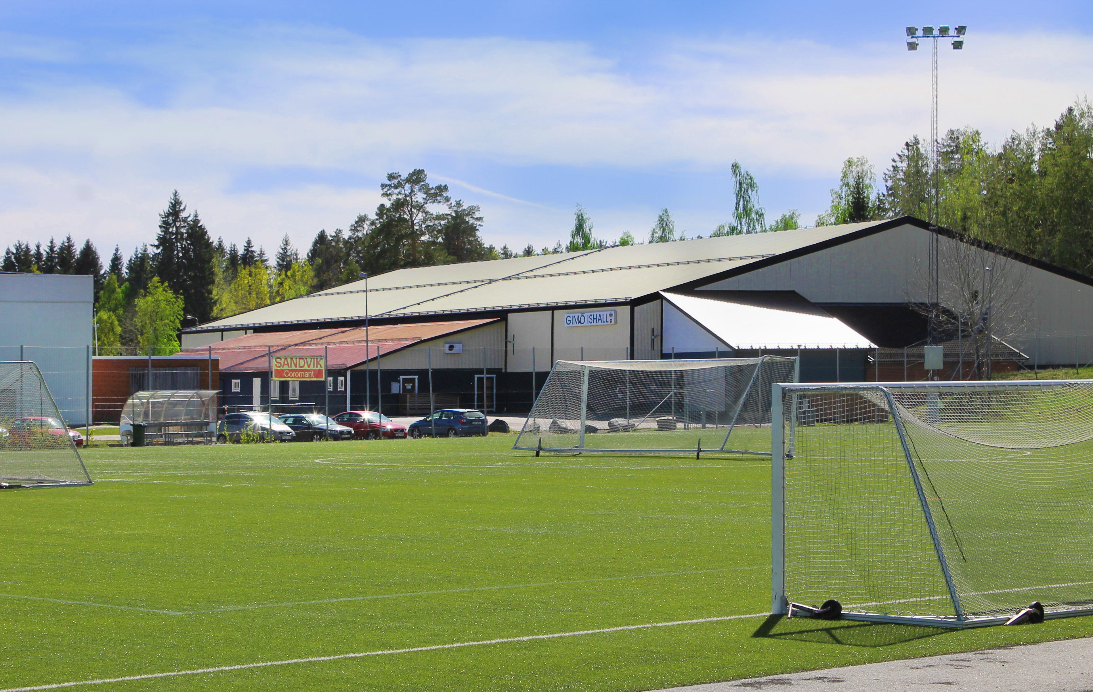 Konstgräsplan i Gimo. Gimo ishall i bakgrunden.